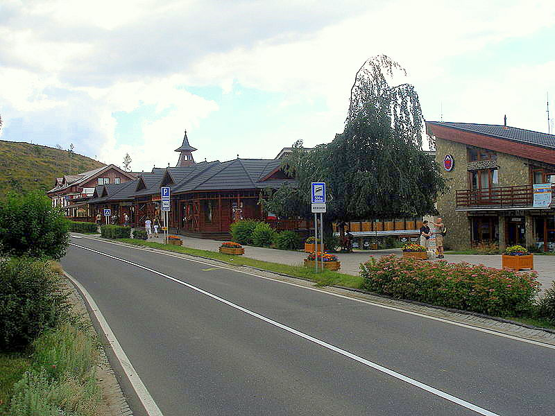 Osada Starý Smokovec